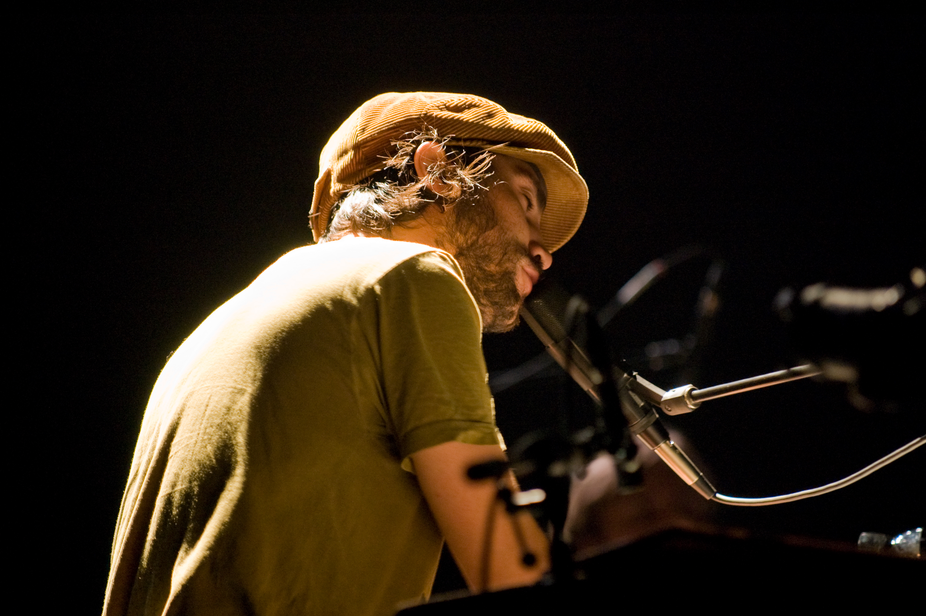 Patrick Watson à Ste-Thérèse, au Québec.